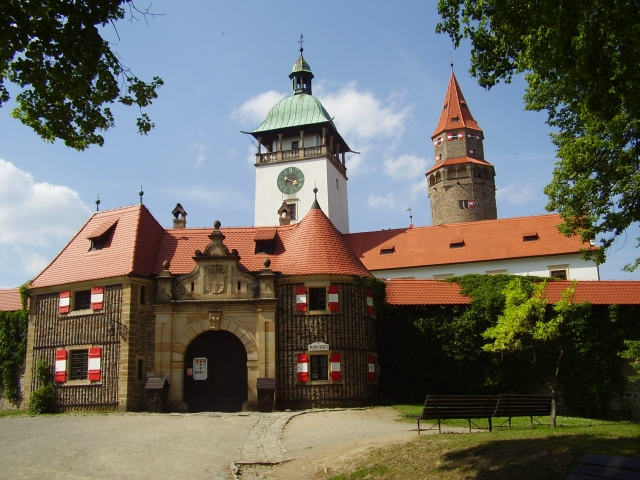 Pohled na vstupní bránu hradu Bouzov. (en:) View at entrance gateway of castle Bouzov.